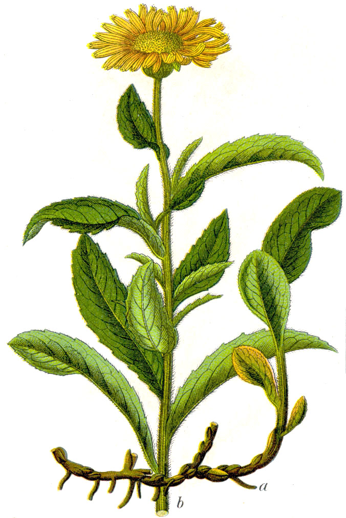 Inula hirta L. Original Caption Rauher Alant, Inula hirta